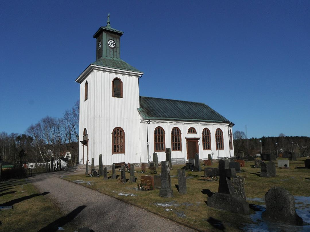 Älvsereds kyrka exteriör från söder